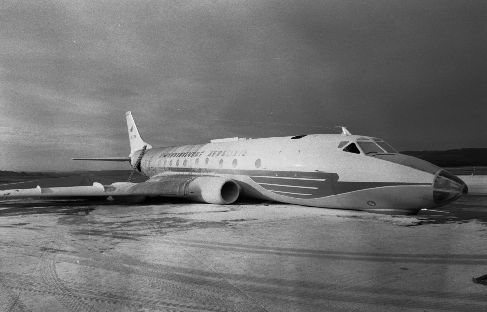 CSA744便は、1970年8月18日にチューリッヒ空港で誤って胴体着陸をし、機体は全損扱いとなった。